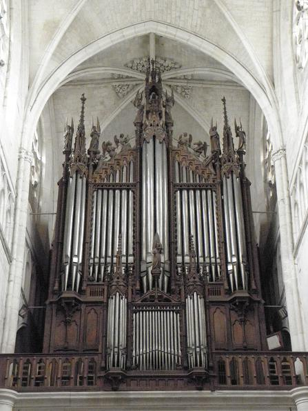 Grandes-Orgues Cavaillé-Coll de la cathédrale de Luçon (85)